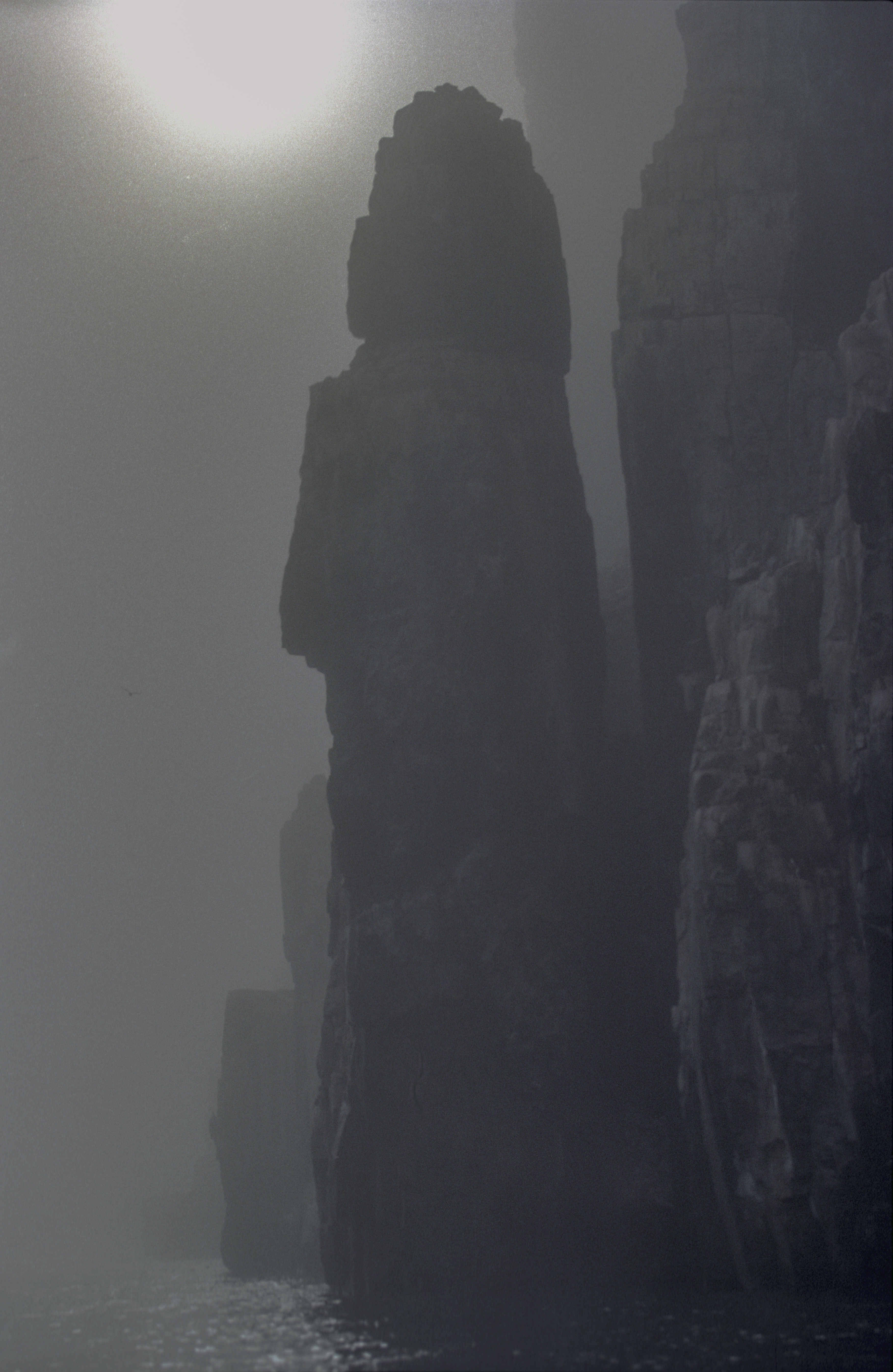 Spitsbergen, Alkefjellet